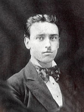 Georges Eekhoud, né le 27 mars 1854 à Anvers et mort le 29 mai 1927 à Schaerbeek, est un écrivain homosexuel et anarchiste belge.